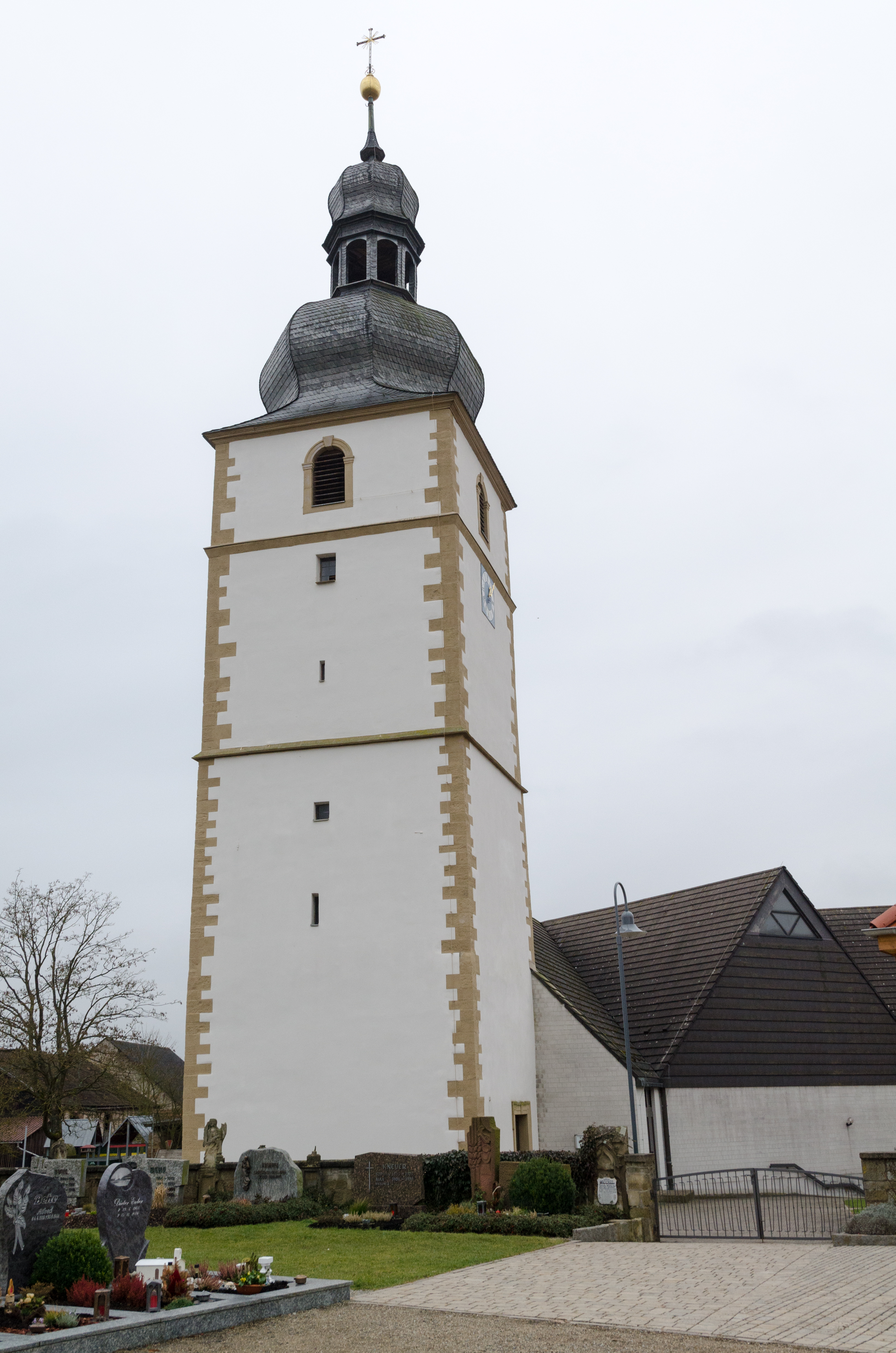 Kath. Pfarrkriche in Großbardorf, Neubau mit historischer Ausstattung